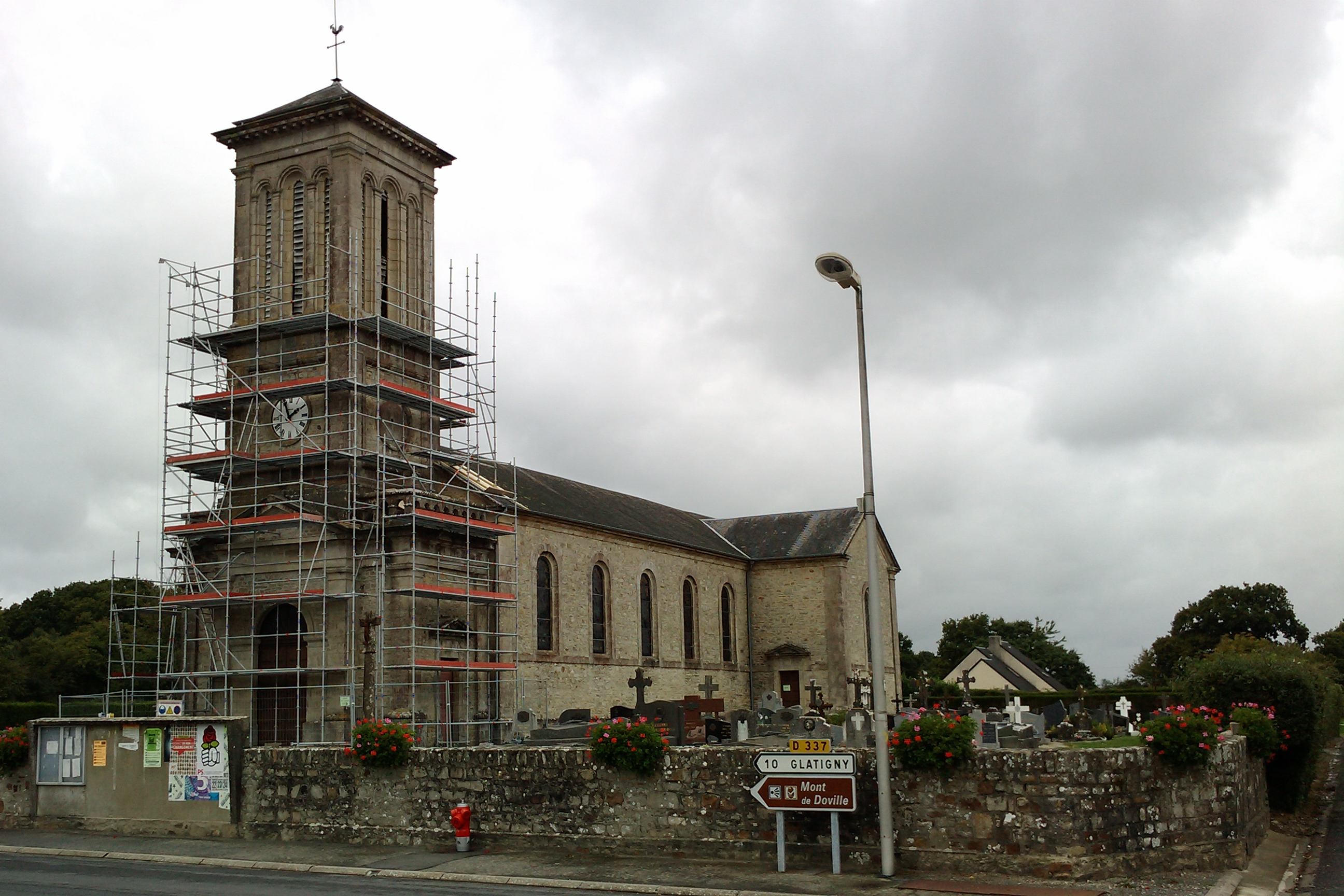 Église en rénovation de Doville